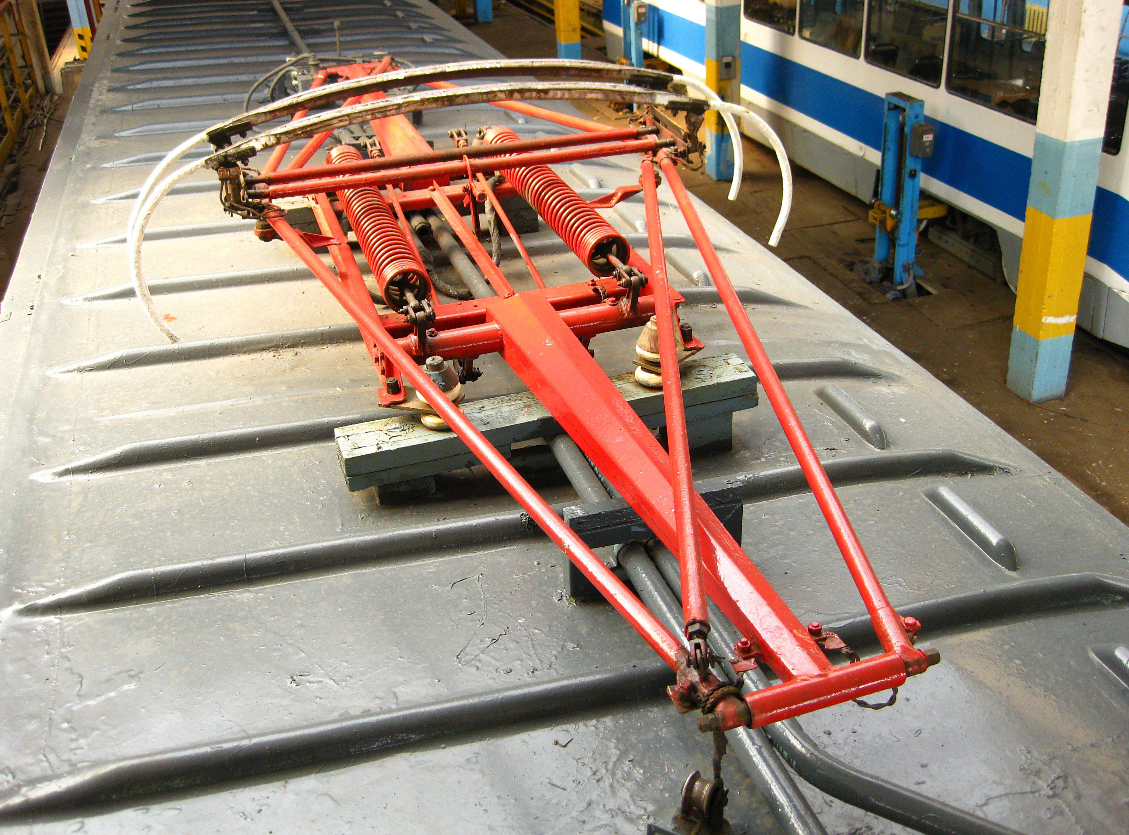 Пантограф трамвайного вагона 71-608.